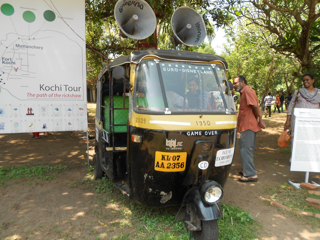 കൊച്ചി-മുസിരിസ് ബിനാലെ 2012 ൽ ജിയുസപ്പെ സ്റ്റാംപൊണെയുടെ പെർഫക്റ്റ് വേൾഡ് എന്ന നവ മാധ്യമ പ്രതിഷ്ടാപനം ആസ്വദിക്കുന്നവർ